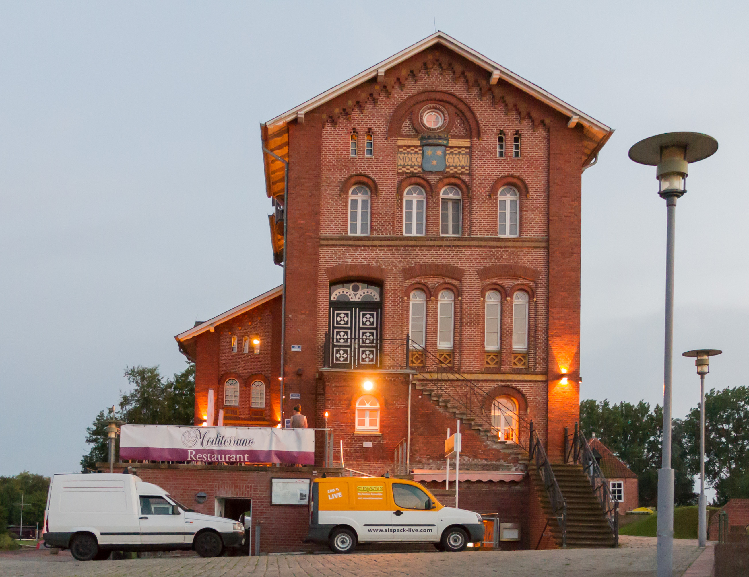 Das alte Zoll- und Packhaus (Norden) wurde 1857 erbaut. Das Gebäude steht unter denkmalschutz